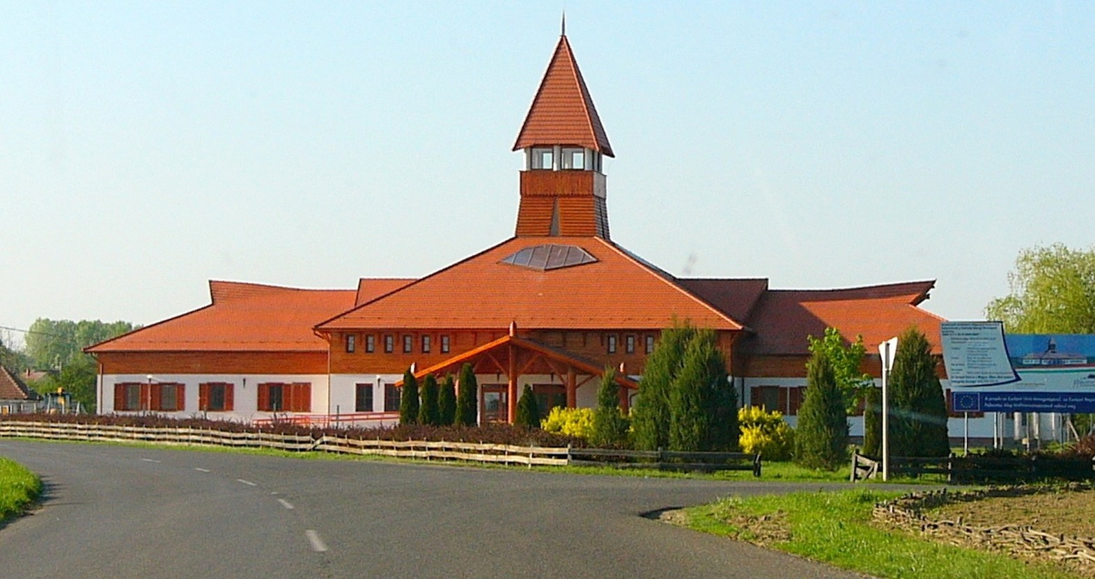 Kisar, 4921 Hungary. - ...Kisar mellett kanyarog a szeszélyes Tisza, mely áradásaival sokszor veszélybe sodorta a települést. Itt vezet át a Szatmárt és Bereget összekötő híd, melyről nyáron több százan figyelik a tiszavirágzást...műemlék jellegű református temploma 1794-ben épült késő barokk stílusban, homlokzati toronnyal. Főbejárata a déli oldalon van, tornya négyzet alakú, gúlasisakos. 1877-ben átépítették eklektikus stílusban… Útközben